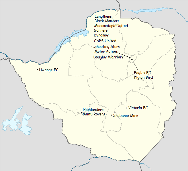 Equipas do campeonato de zimbabwe de futebol : temporada 2010 ;)